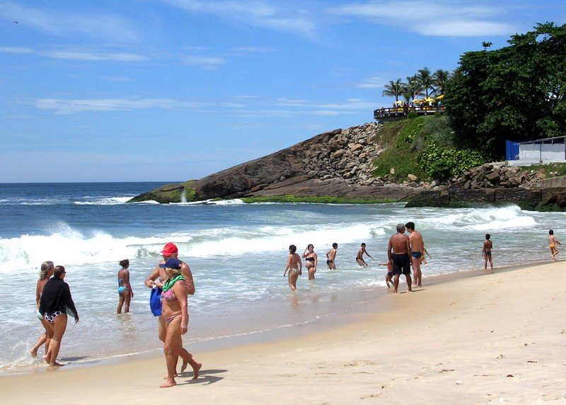 Mirador de Leblon, Río de Janeiro, Brasil